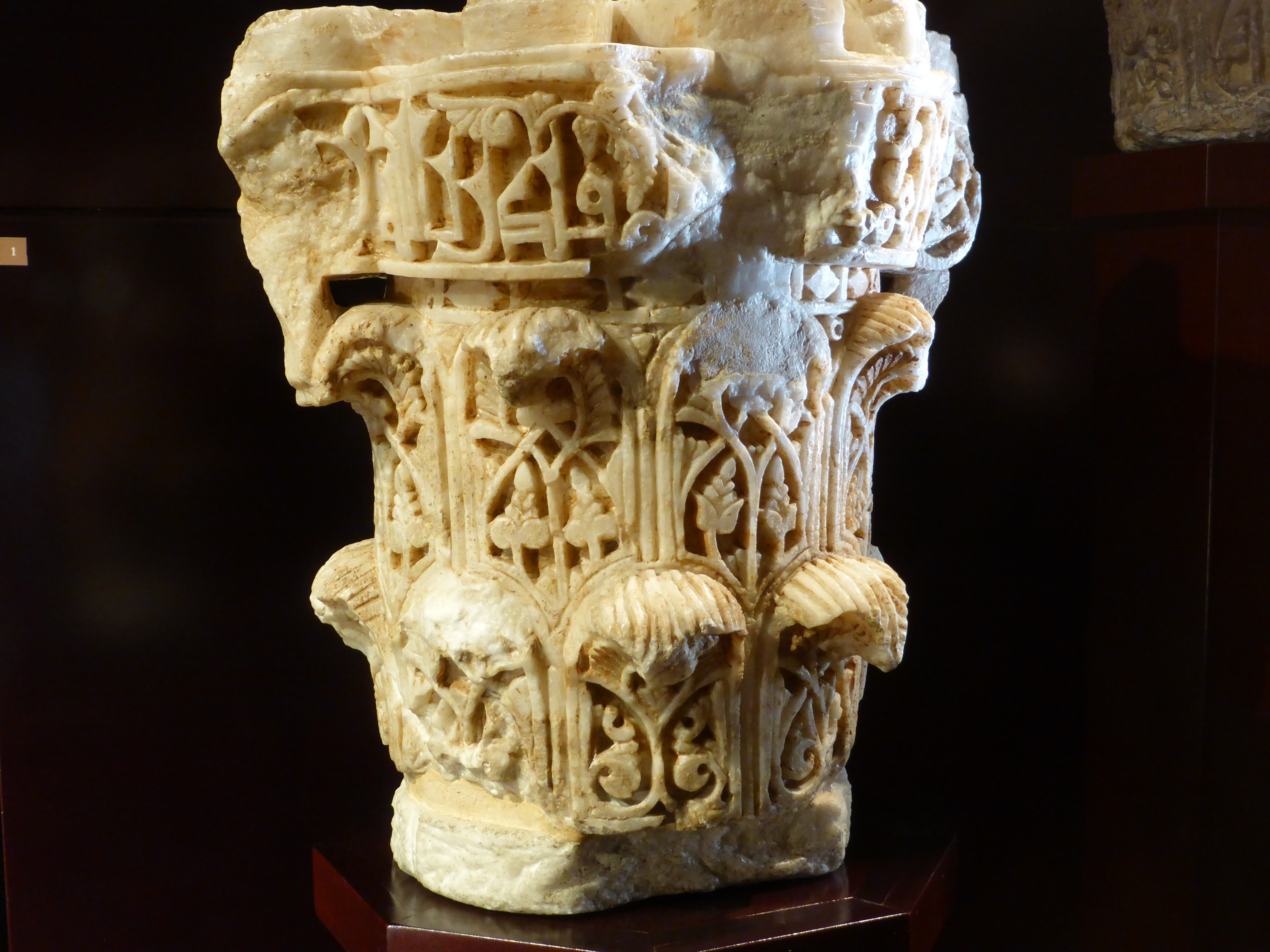 En la ciudad de Zaragoza se encuentra el Palacio de la Aljafería, construido en la segunda mitad del siglo XI, por la taifa de Saraqusta (el reino independizado del califato de Córdoba). La taifa de Zaragoza existió en la época islámica, poco antes de la reconquista cristiana. Este capitel se exhibe de forma musealizada en el propio palacio. Es un capitel de orden corintio, propiedad del Museo de Zaragoza, pero depositado en la Aljafería.